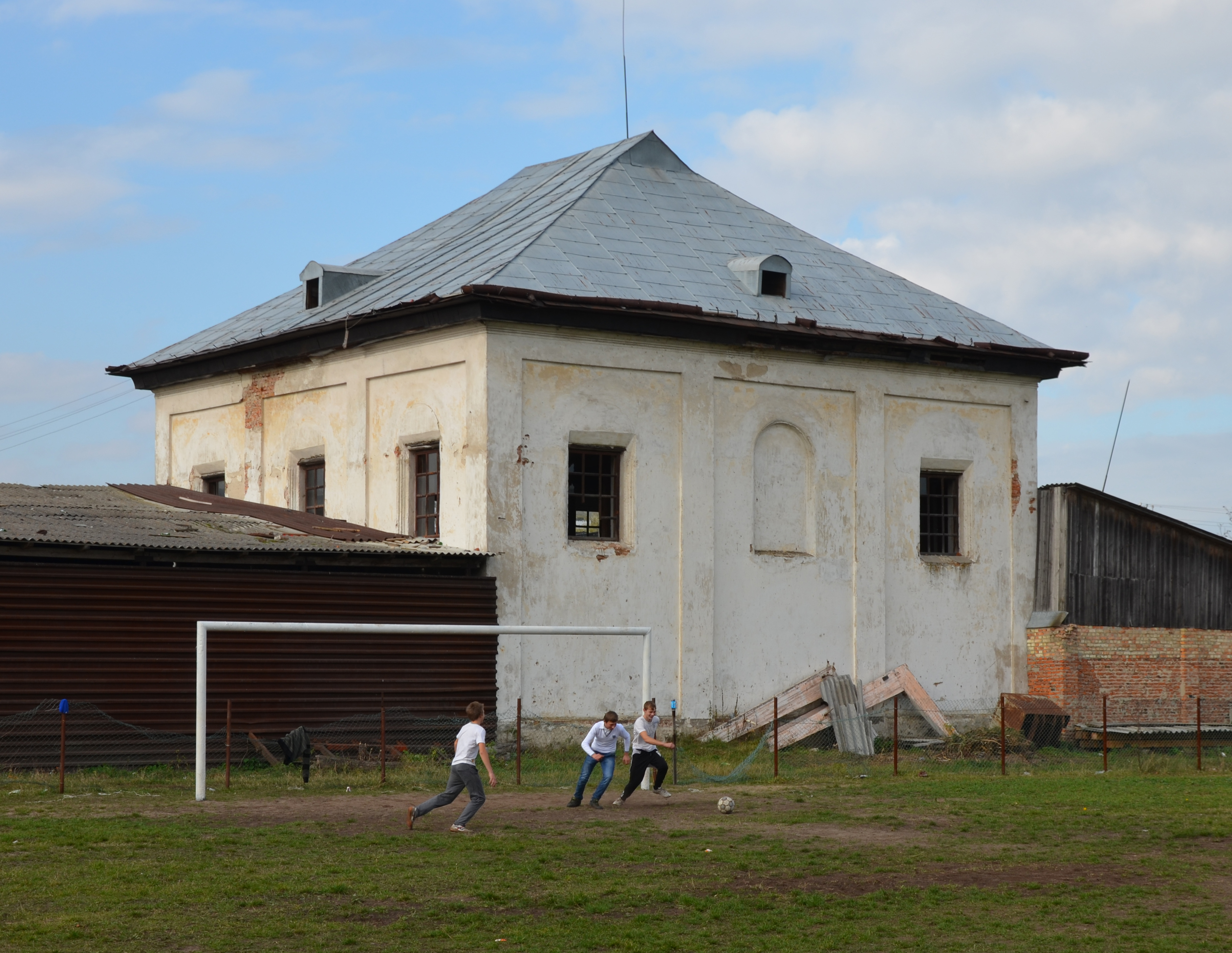 Колишня синагога в селі Топорів Буського району.